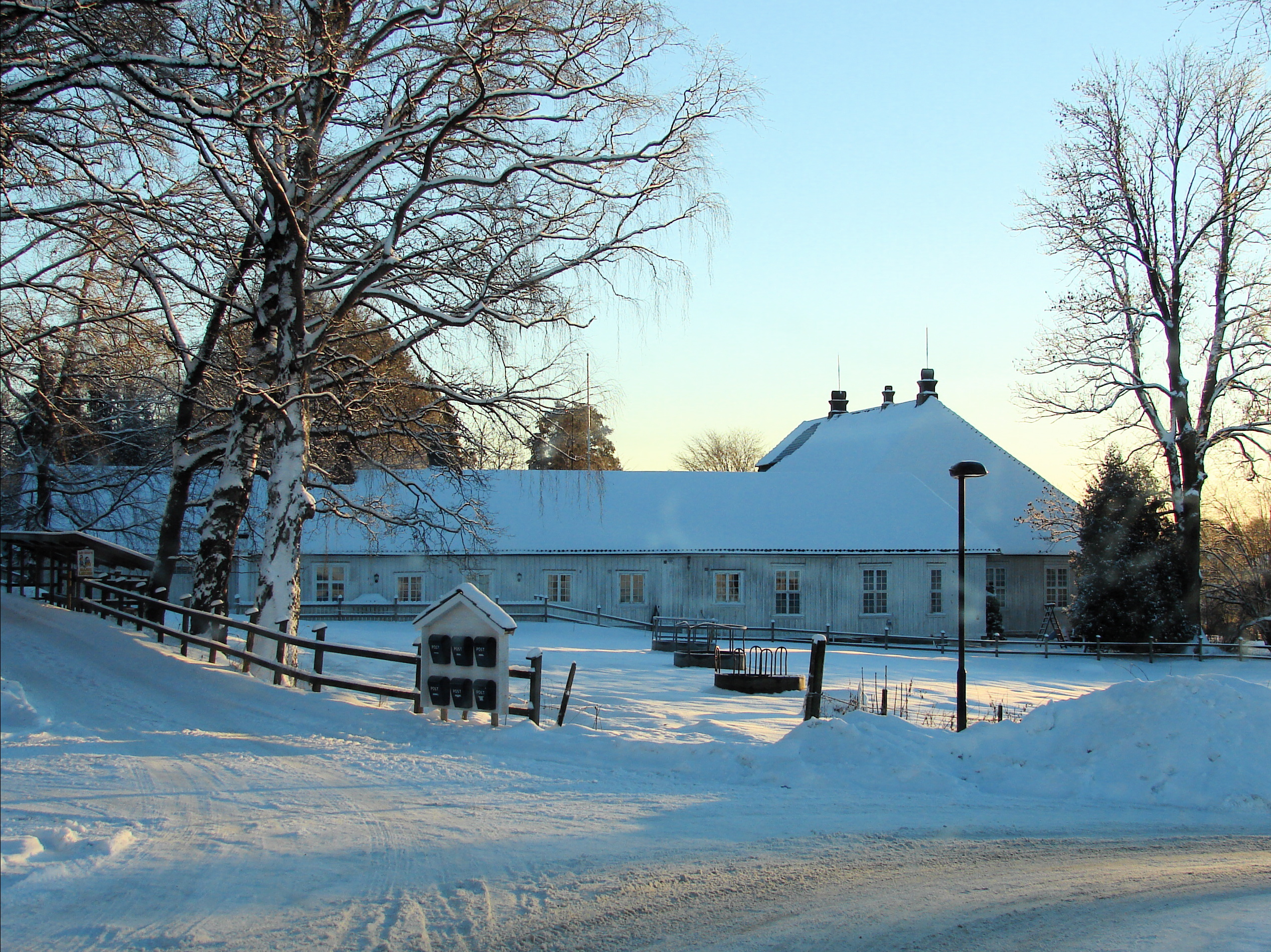 Borgestad Gård, Skien, Norge